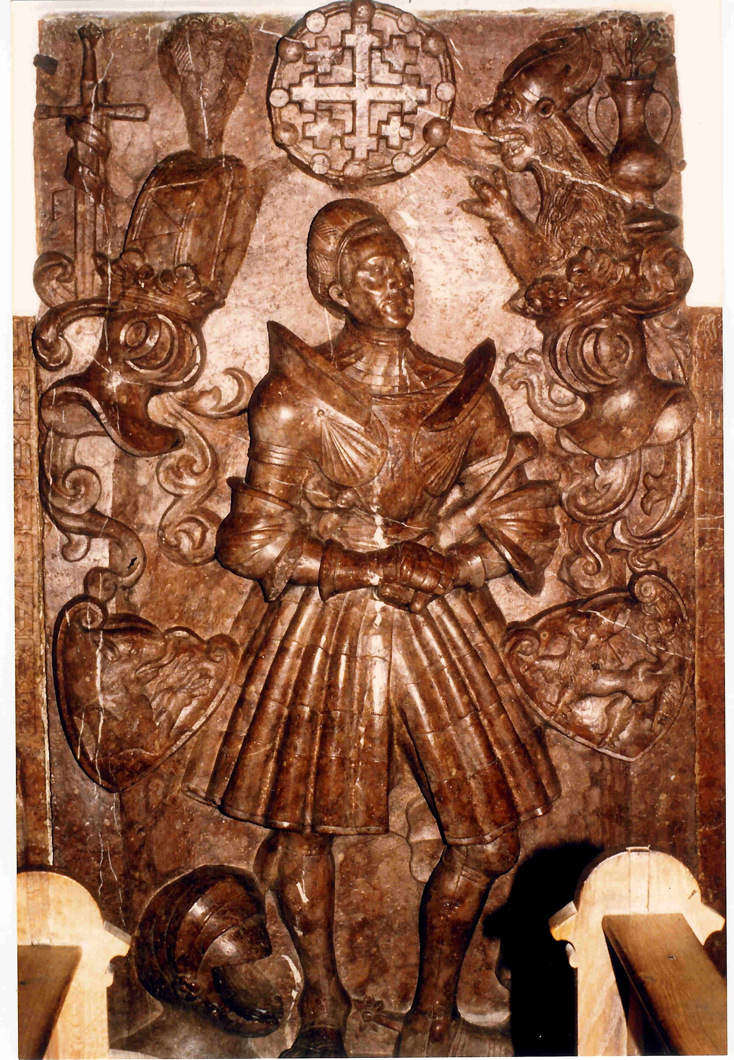 Grabstein des Degenhart Pfäffinger in der Kirche von Salmanskirchen bei Ampfing in Bayern (Deutschland) aus rotem Marmor.